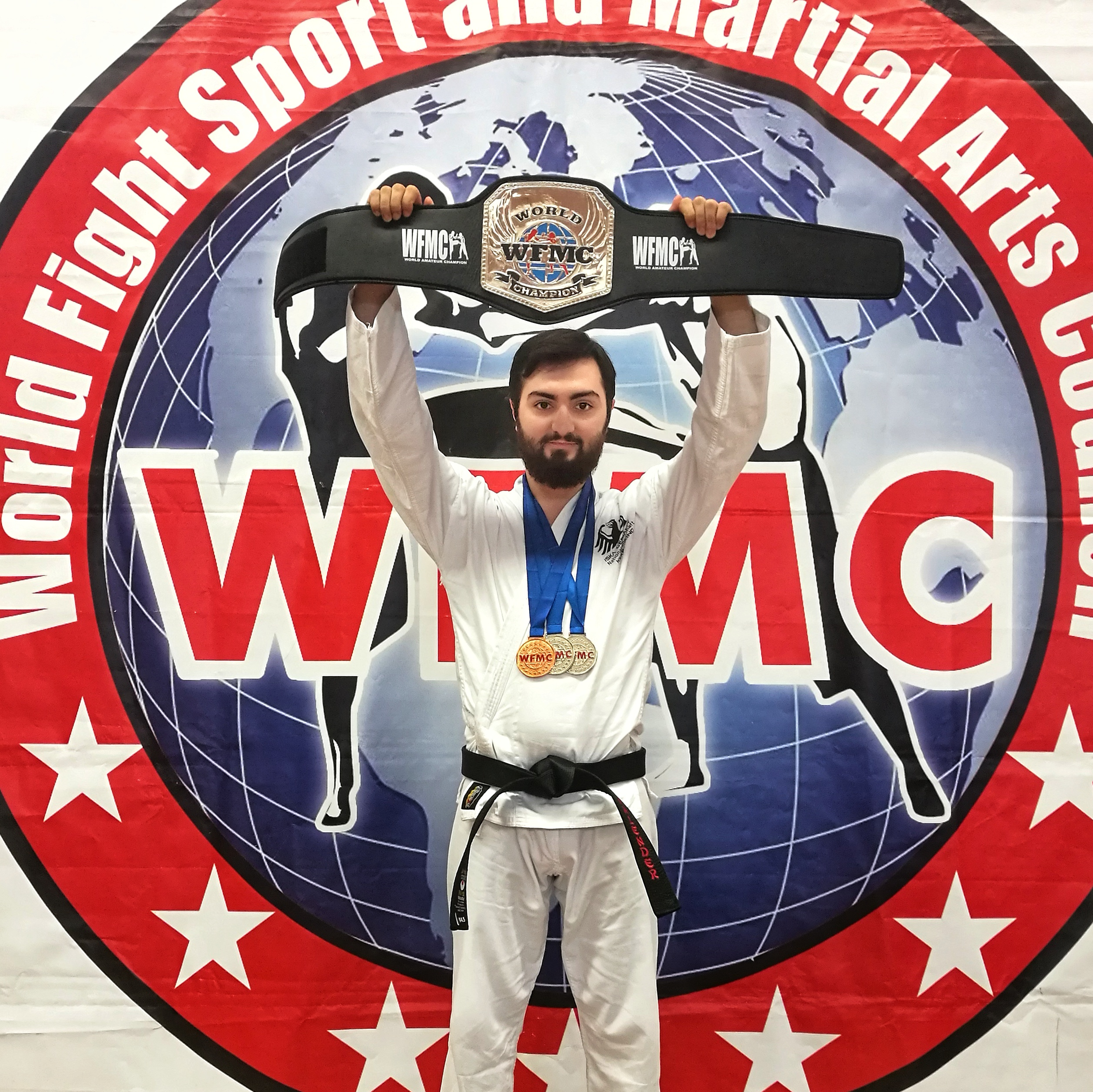 Abdulkadir Kalender Belt